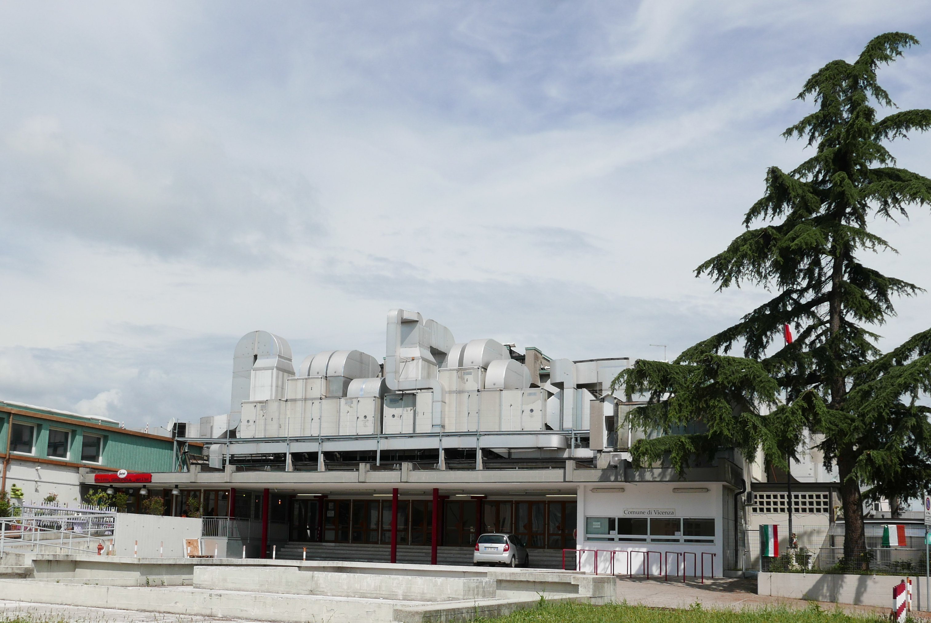 Palasport Città di Vicenza, zona Quartiere Italia